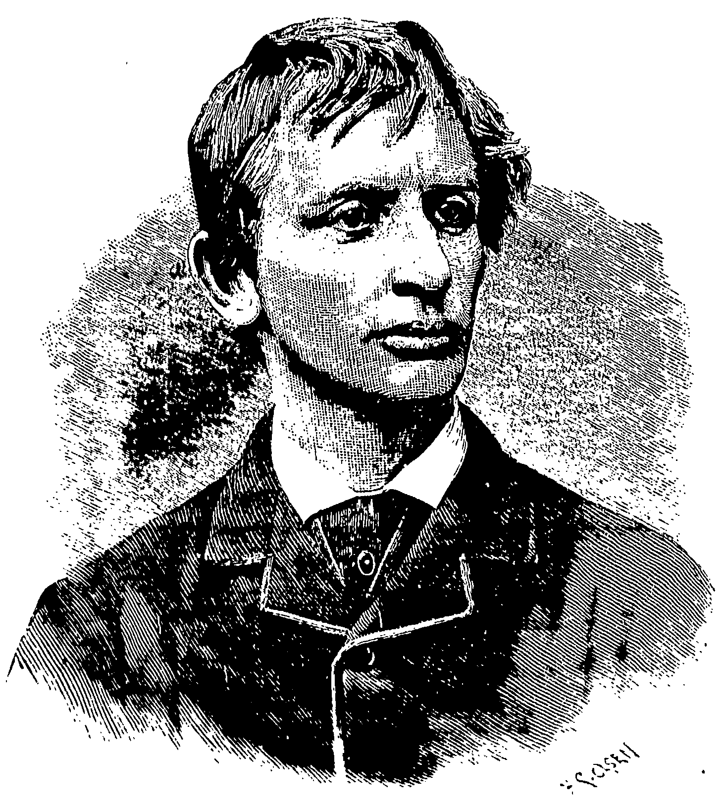 Den norske billedhuggeren Stephan Sinding (1846–1922).